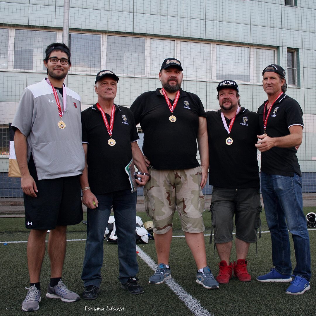 Алексей и тренерский штаб Московских Спартанцев. Кери Ярусси (США) Алексей Геец,Андрей Громов, Лаирд Сенотто.